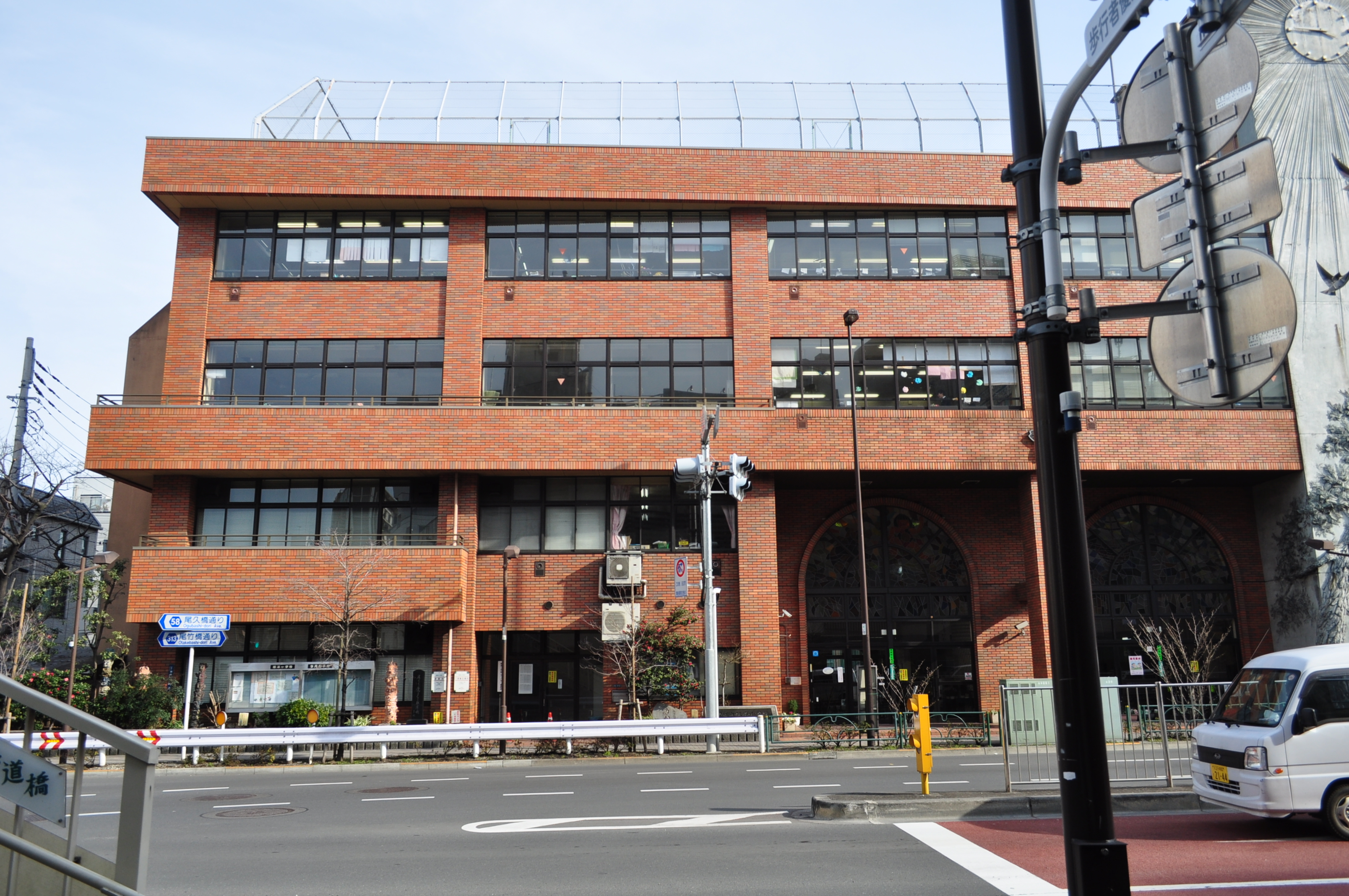 台東区立根岸小学校